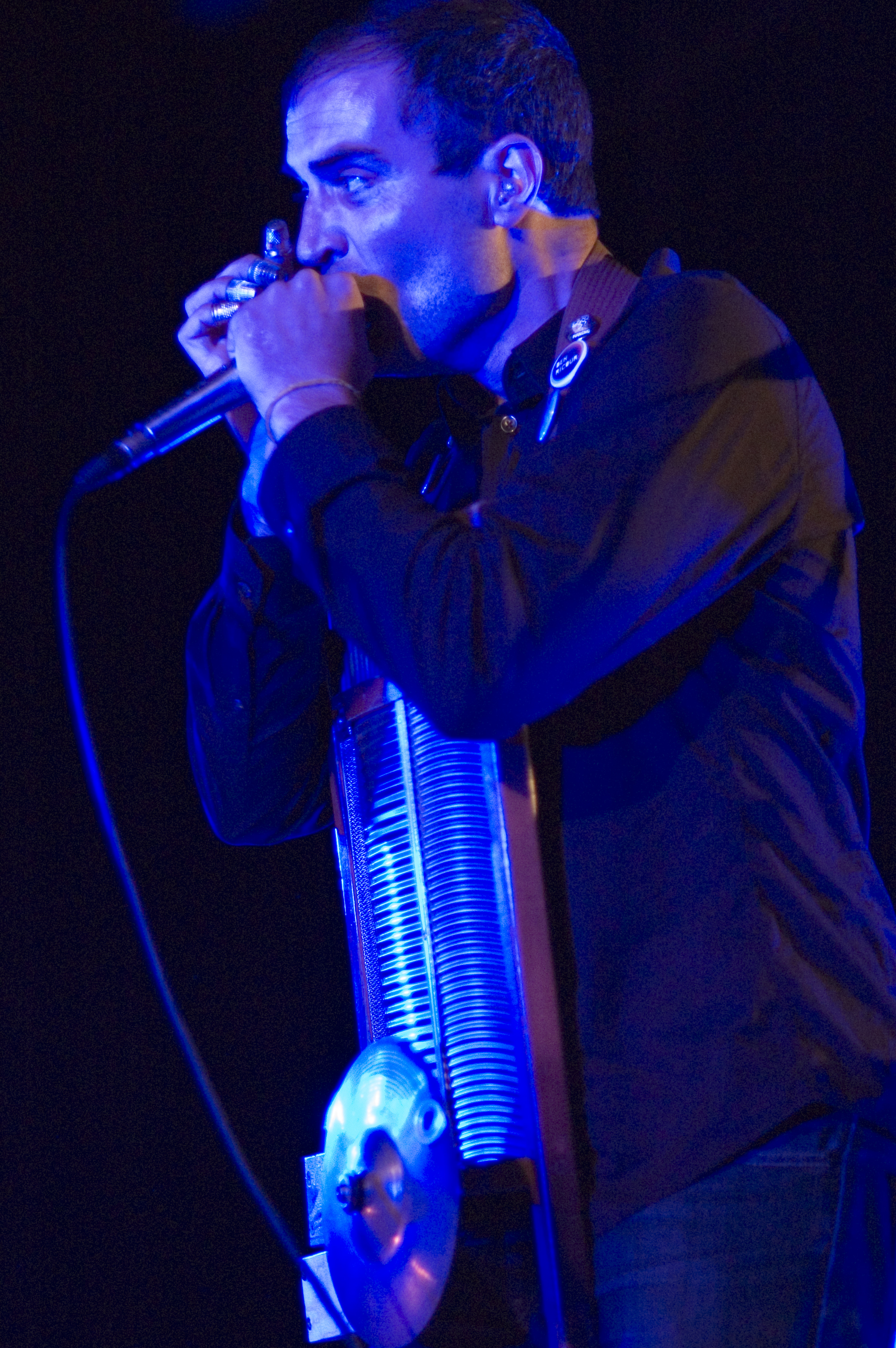 Plogonnec 2011